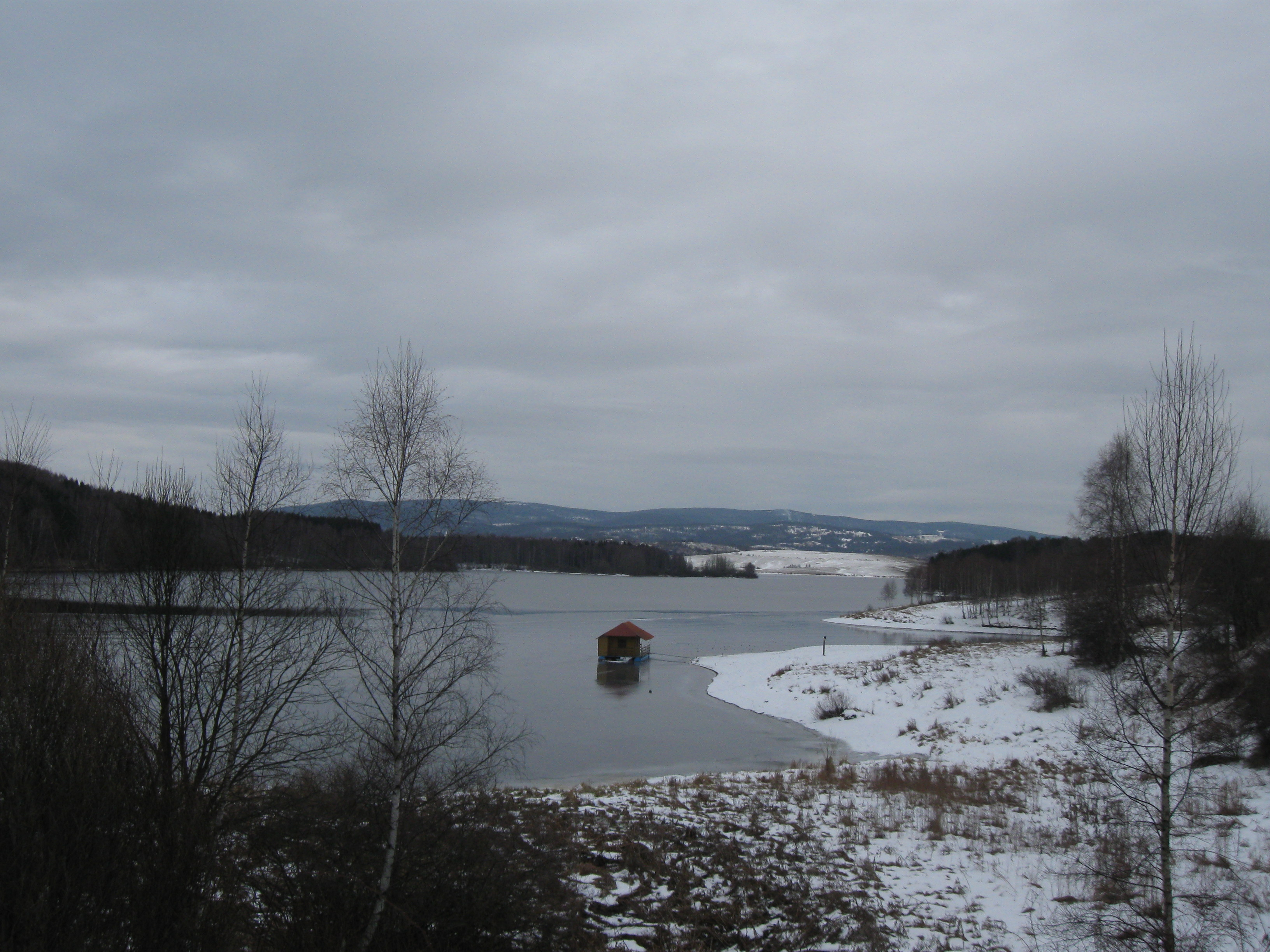 autor: Radosav Stojanovic